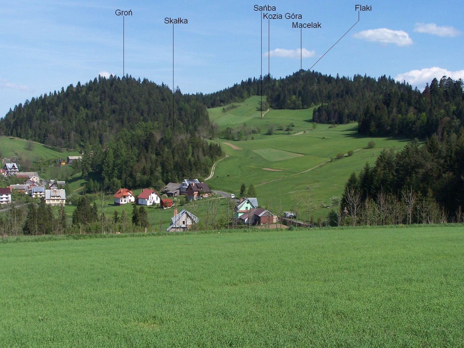 Widok na Hałuszową i Pieniny Czorsztyńskie z rejonu przełęczy Osice. Po lewej stronie u góry Groń i przełęcz Sańba